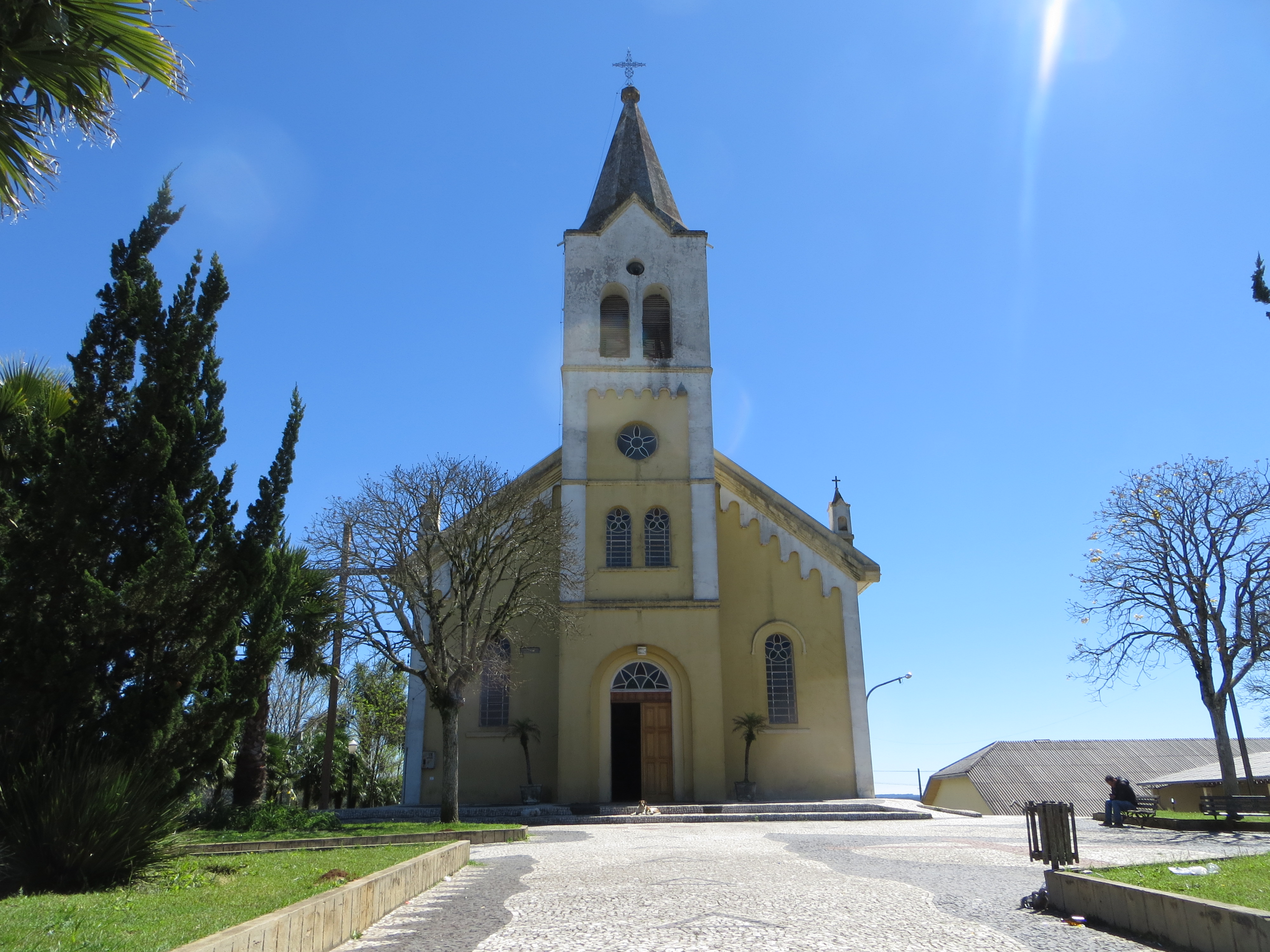 Igreja Matriz de São João do Triunfo, estado brasileiro do Paraná, região sul do país.